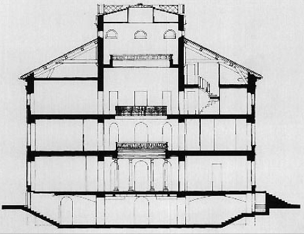 Coupe transversale ouest-est de la villa palladienne construite aux forges de Syam par l'architecte Champonnois l'Aîné pour Emmanuel Jobez vers 1826